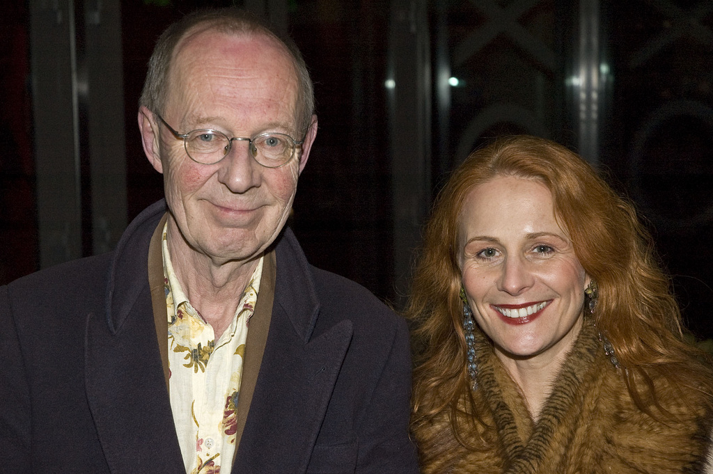 Hans-Peter Korff and his wife Christiane Leuchtmann